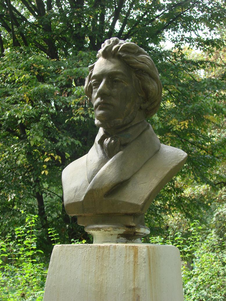 пам'ятник Адаму Міцкевичу у Бориславі: пам'ятник Адаму Міцкевичу у Бориславі